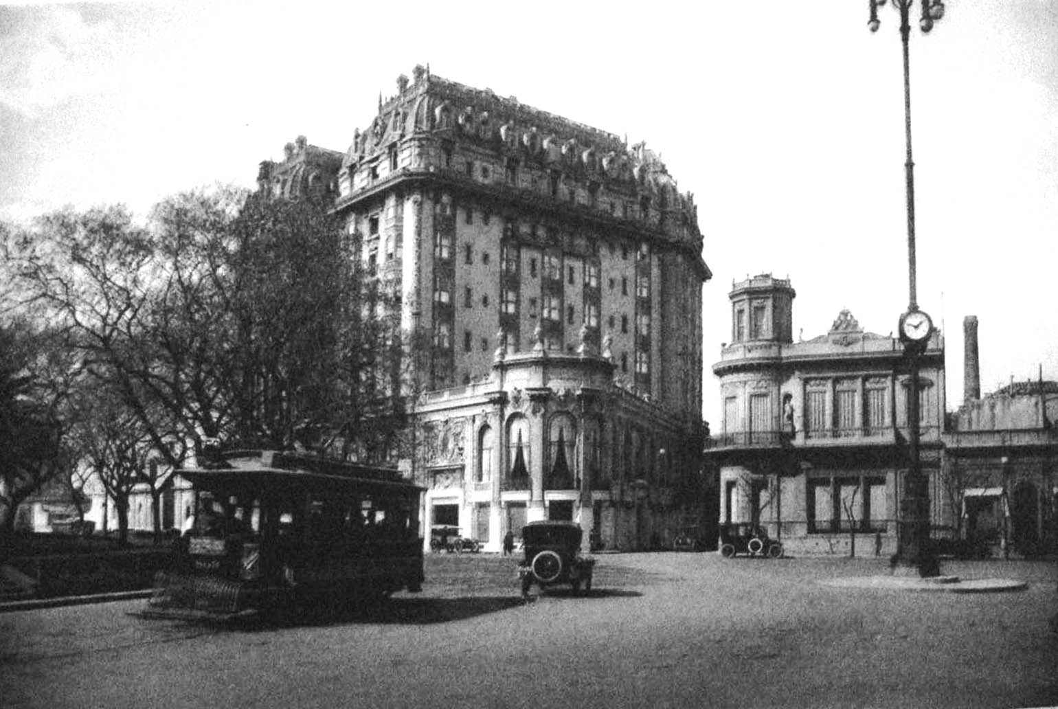 Plaza Hotel de Buenos Aires, Argentina. Vista desde la esquina de Florida y Charcas (hoy Marcelo T. de Alvear). En la esquina a la derecha, la casa de Ernesto Tornquist, dueño del hotel.